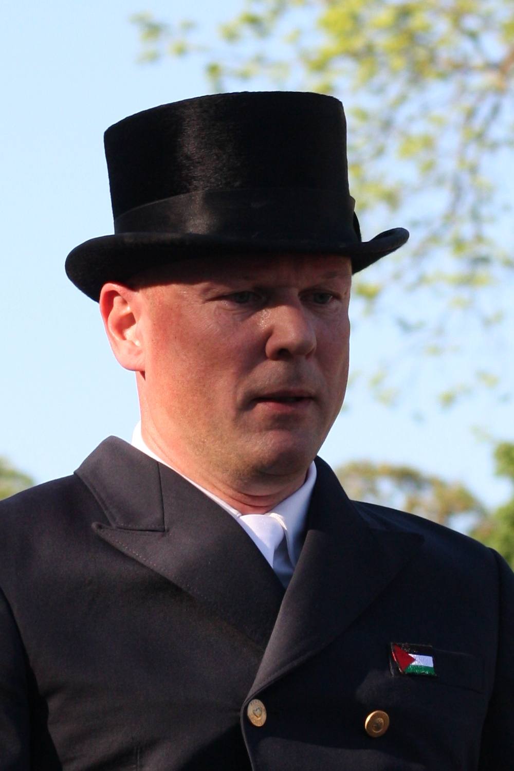 77. Internationales Pfingstturnier Wiesbaden 2013, CDI **** Dressurprüfung Grand Prix de Dressage, Brühe,Christian mit Cinco de Mayo Personality rights warning Although this work is freely licensed or in the public domain, the person(s) shown may have rights that legally restrict certain re-uses unless those depicted consent to such uses. In these cases, a model release or other evidence of consent could protect you from infringement claims.